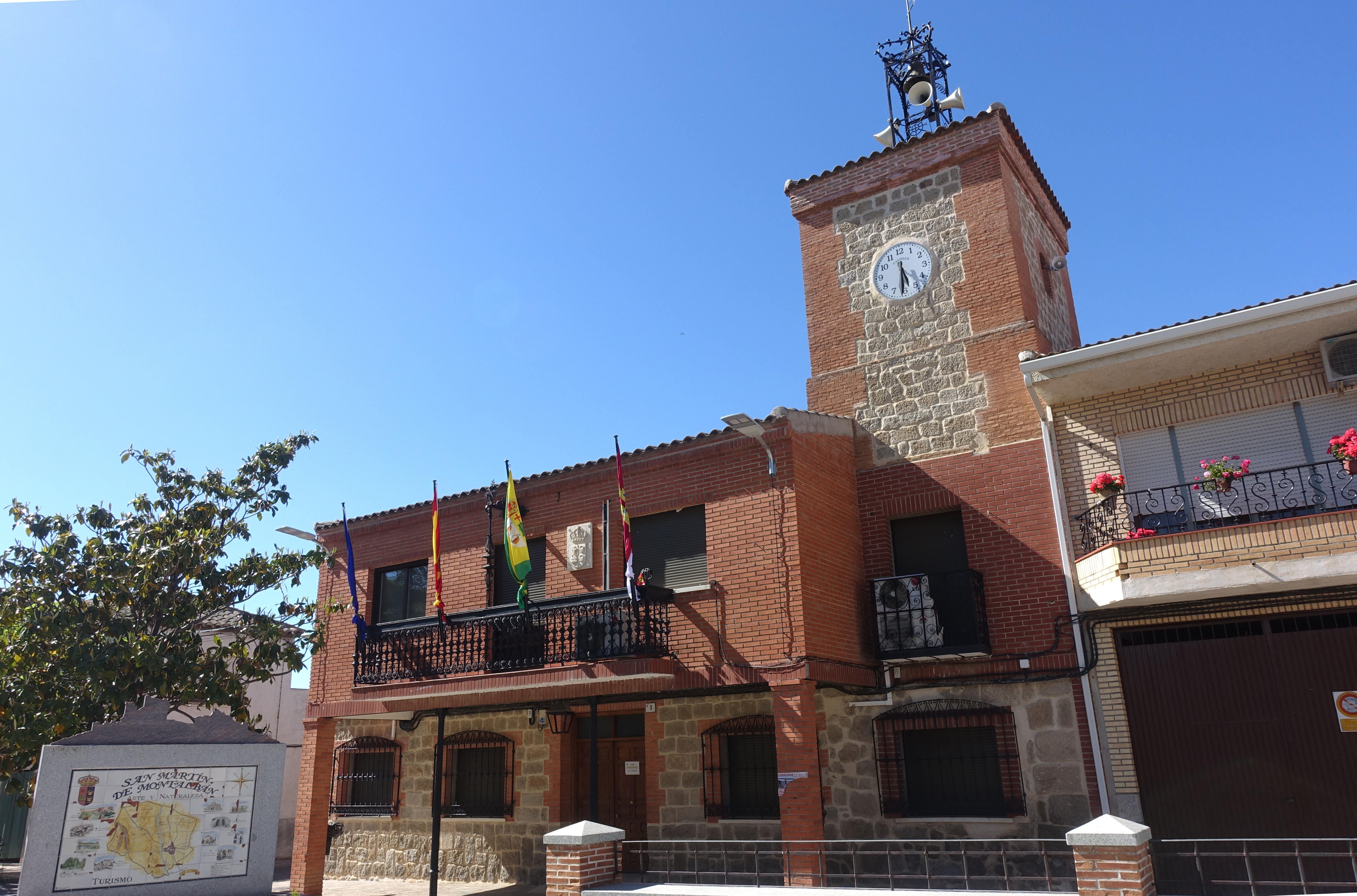 Casa consistorial de San Martín de Montalbán (Toledo, España).